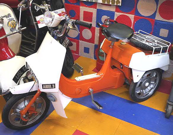 Panasonic G1 14-45 Lens